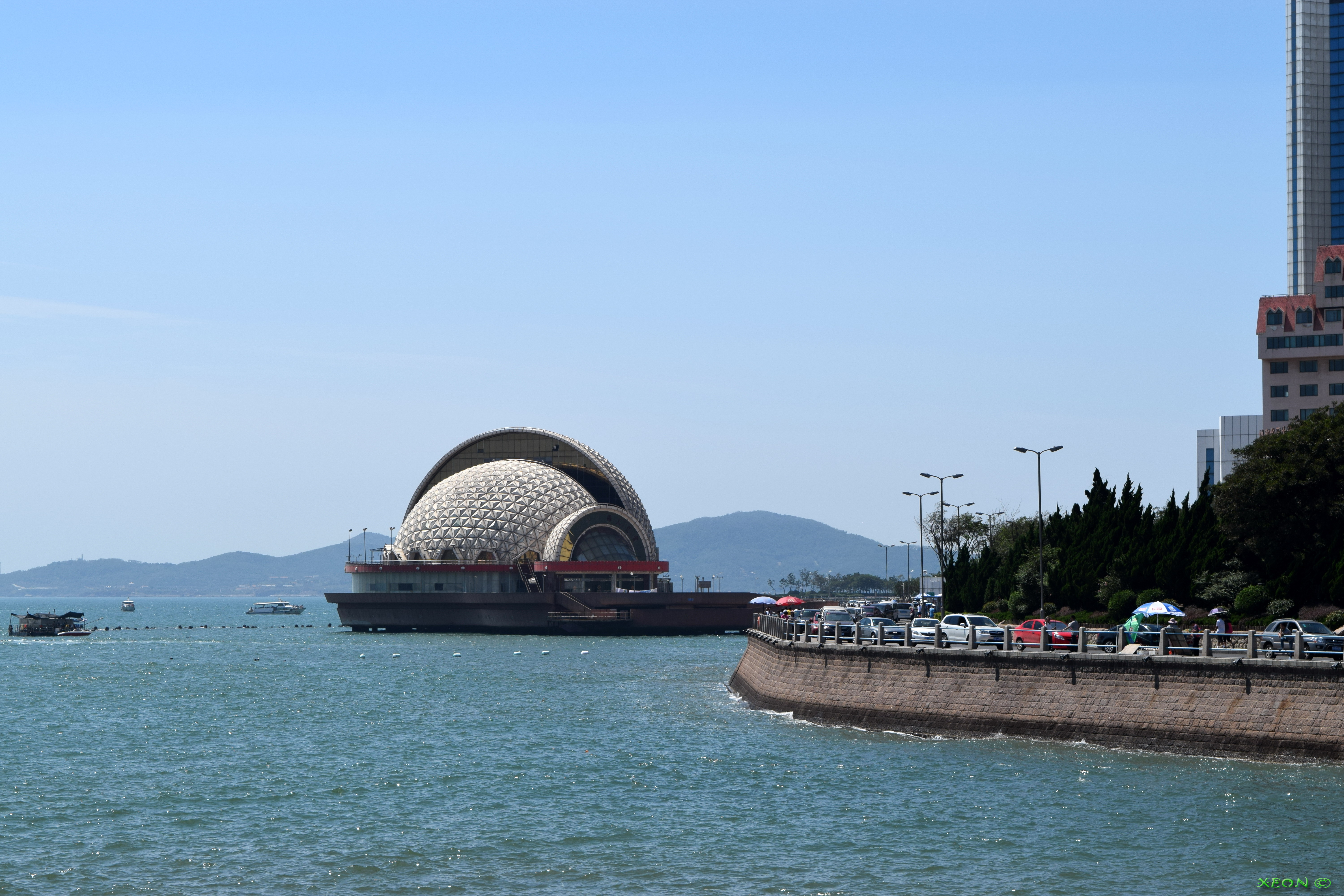 Qingdao 2